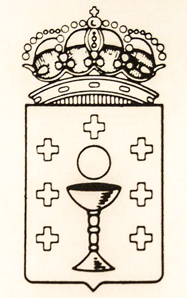 Escudo preautonómico de Galiza, publicado por primeira vez no número 0 do Boletín Oficial da Xunta de Galicia o 1 de decembro de 1978. Foi oficial até 1984.